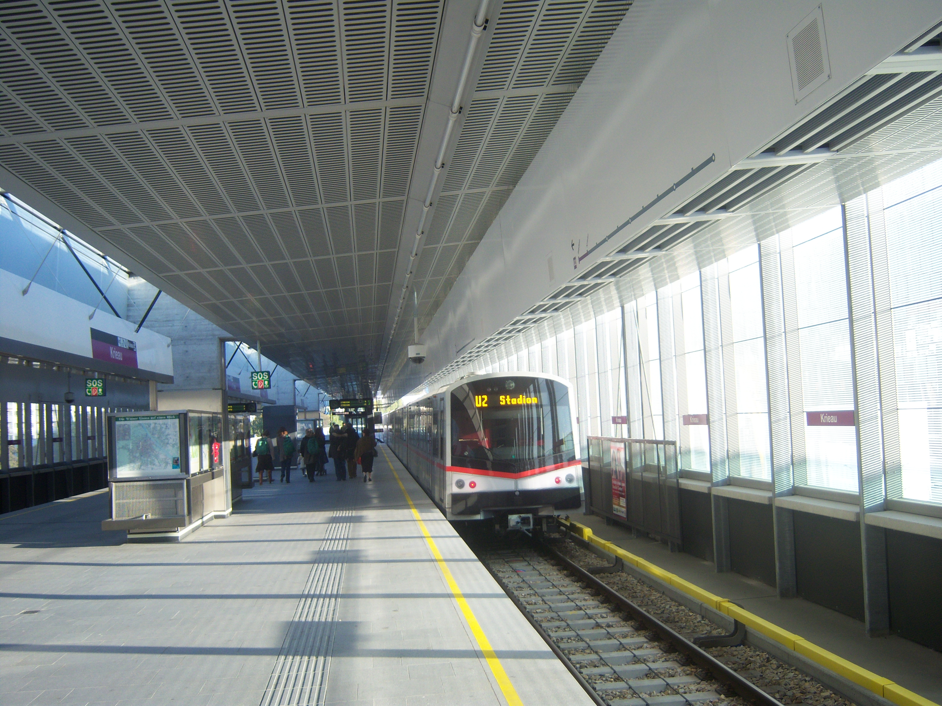 U2-Station Krieau